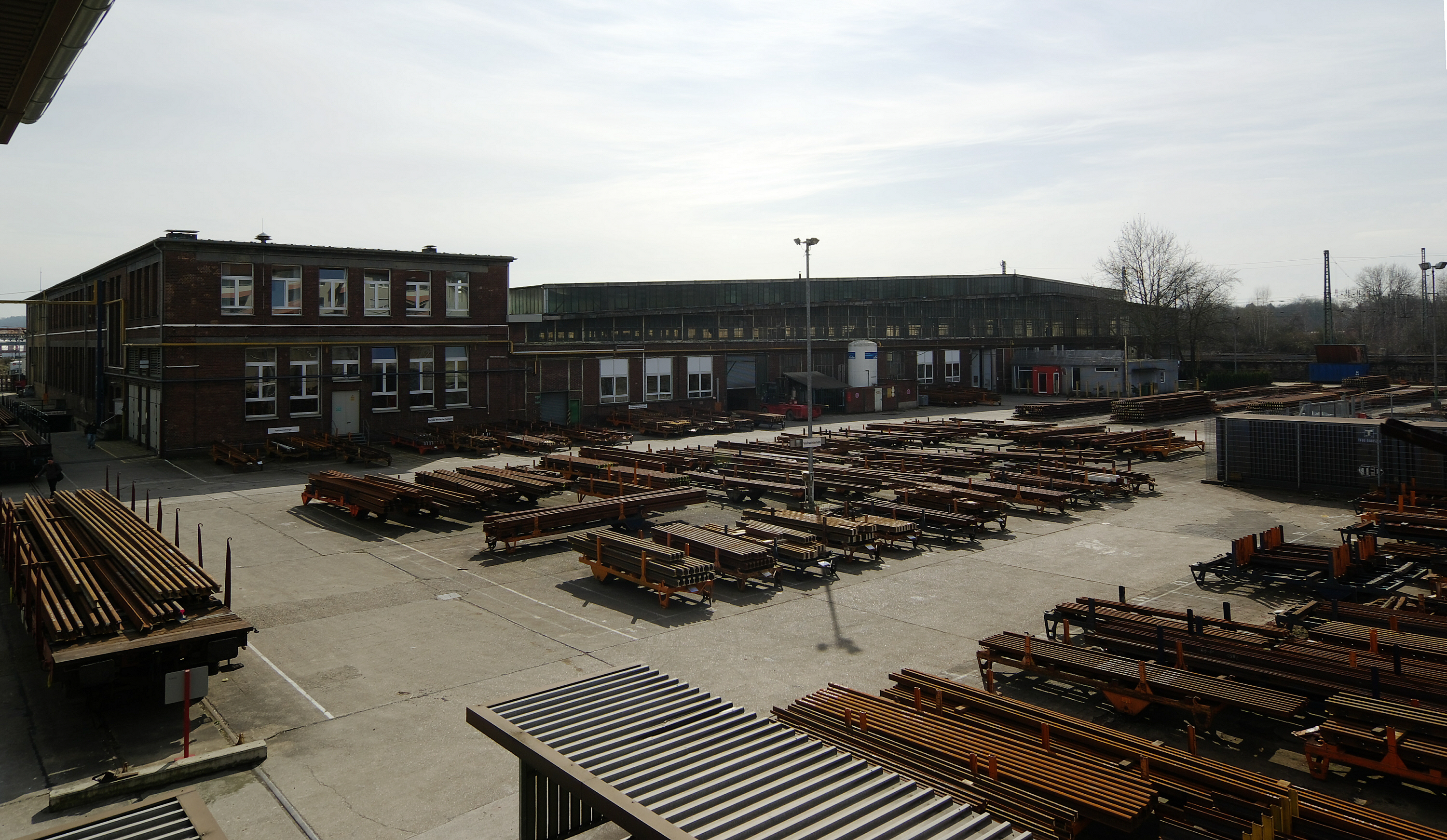 Weichenwerk der Bahn AG in Witten, Blick auf Montagehalle und Schienenlager